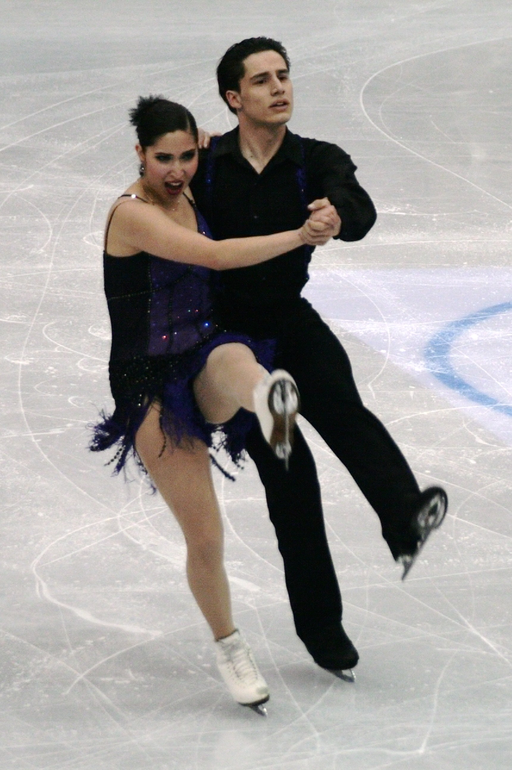 Коренне Брунс и Риан ван Наттен (Мексика) на чемпионате мира по фигурному катанию 2012, предварительный раунд.